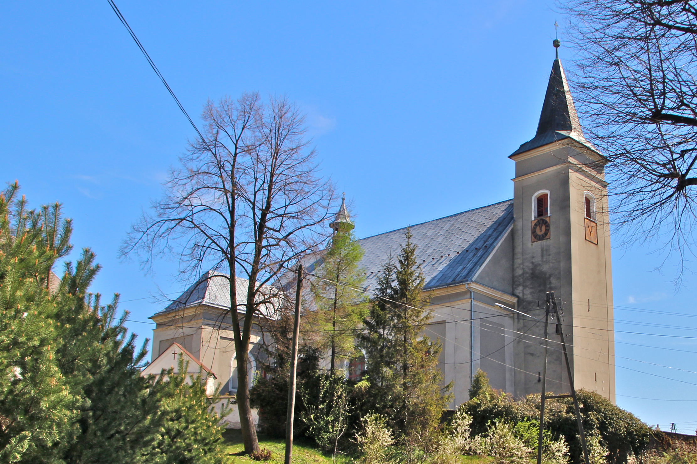 Opawica - kościół parafialny p.w. Świętej Trójcy, 1701-1796, 1829 (zabytek nr 120/54 z 25.08.1954)